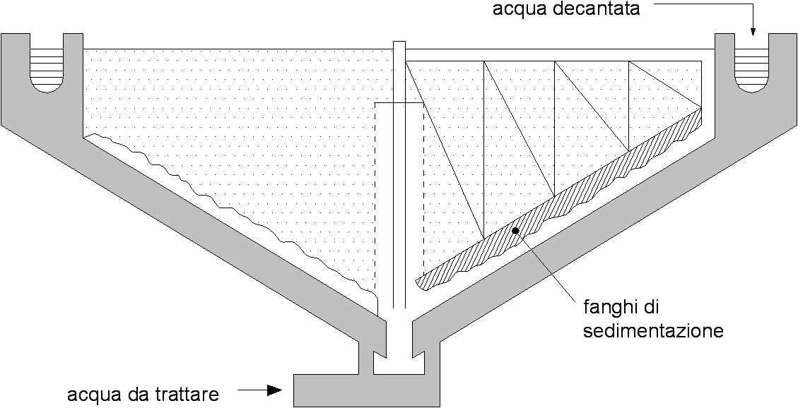 Andy81, opera propria (creata tramite programma architettonico 3D "Arc+"), Sezione di decantatore continuo, licenza libera,note nessuna.